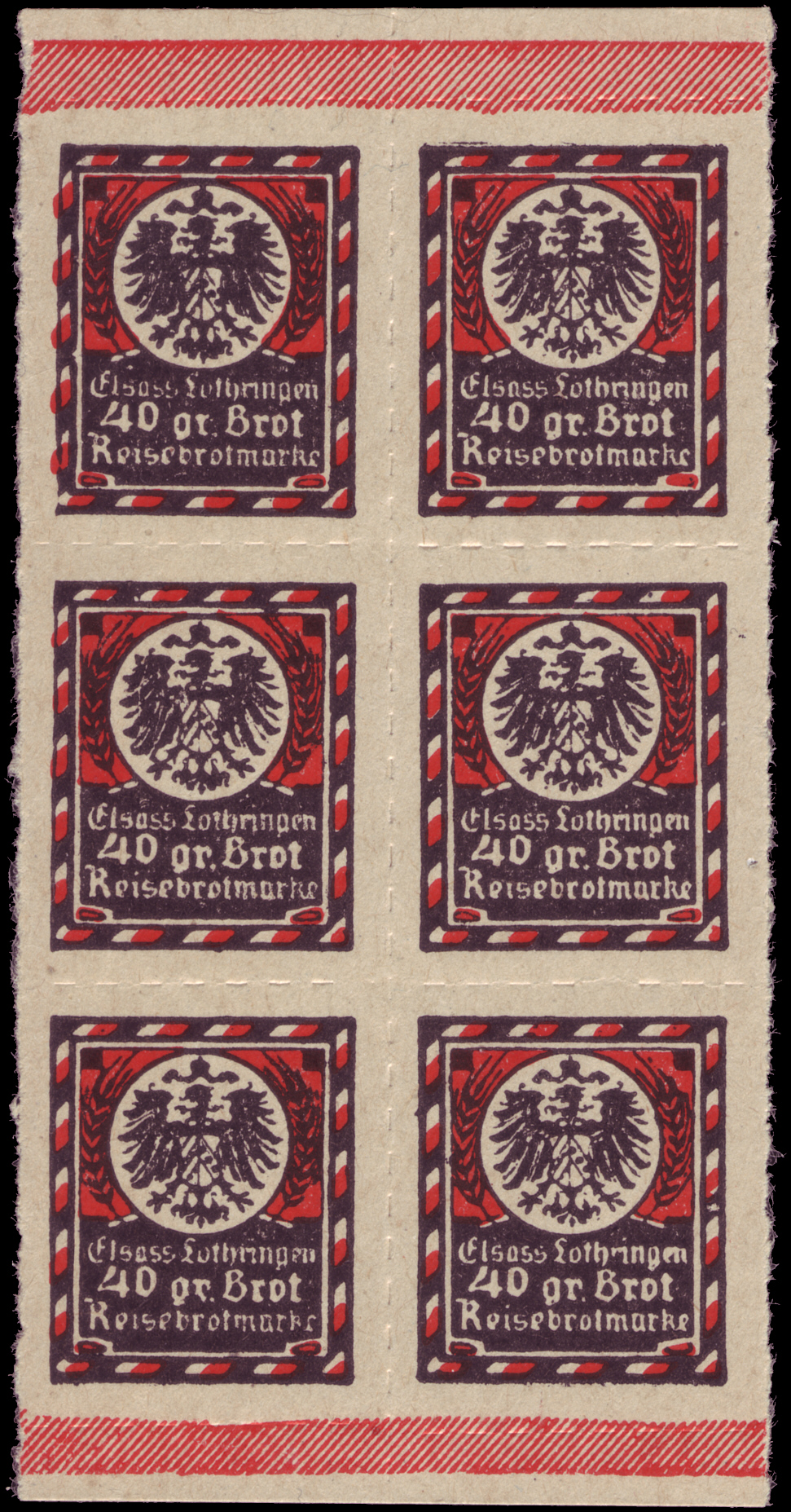 40gr Reise-Brot-Rationsmarken aus Elsaß-Lothringen aus der Zeit des ersten Weltkrieges